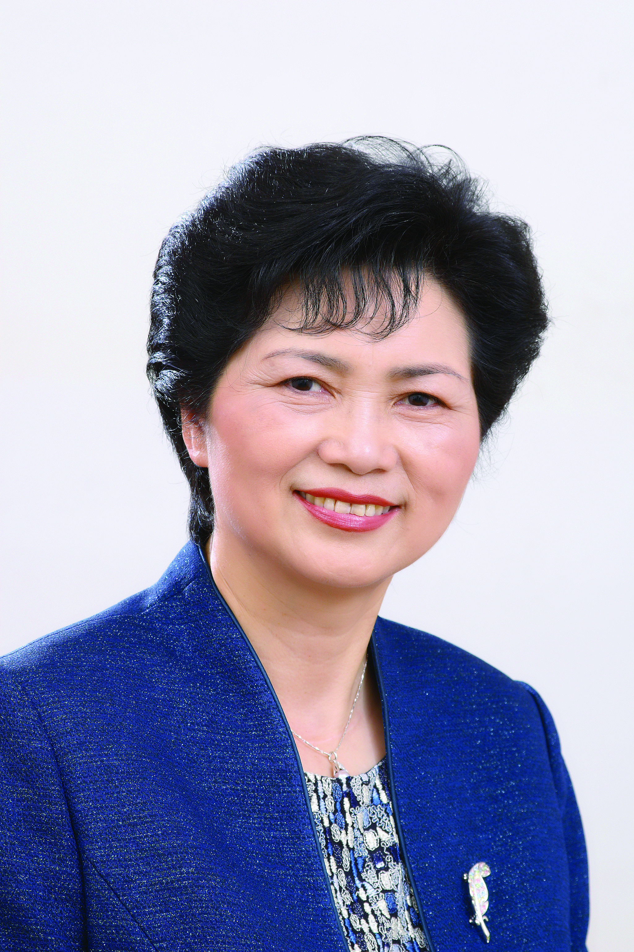 中文（中国大陆）: 中国工程院院士李兰娟女士